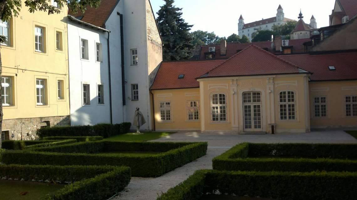 Lisztova záhrada, Staré Mesto, Bratislava